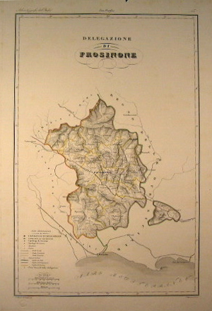 Carta della Delegazione di Frosinone nel 1842, in Atlante geografico dell'Italia - Stato Pontificio di P. Manzoni.